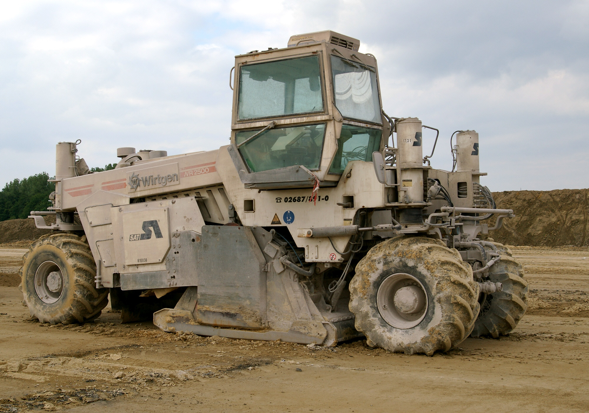 Bodenstabilisierer/Kaltrecycler